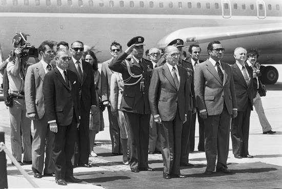 ראש הממשלה מנחם בגין בביקור בקהיר.